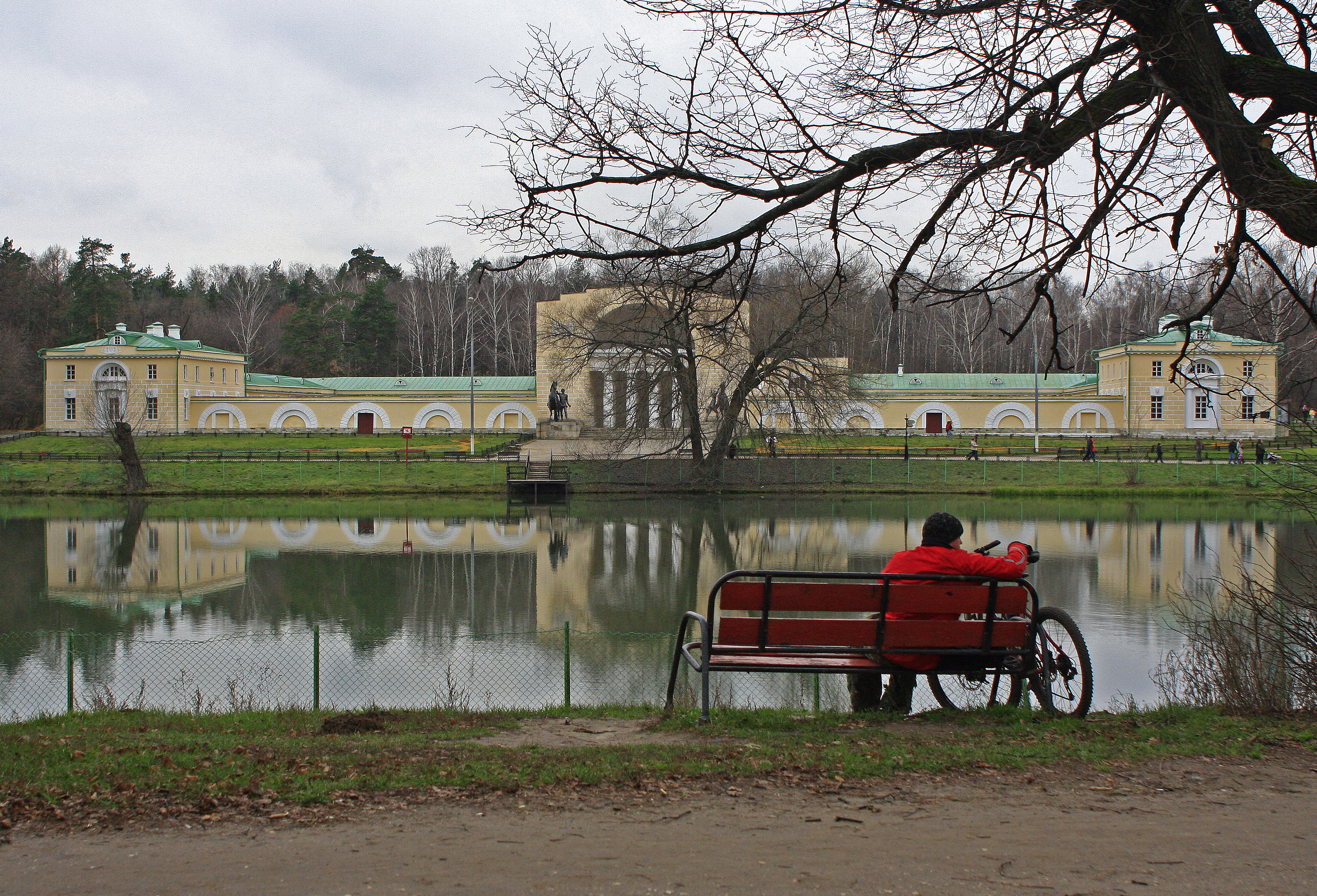 Кузьминки, усадьба: Ближайшая станция метро - "Кузьминки",Москва,Юго-Восточный округ, Москва This image is related to the protected area of Russia number 7710448